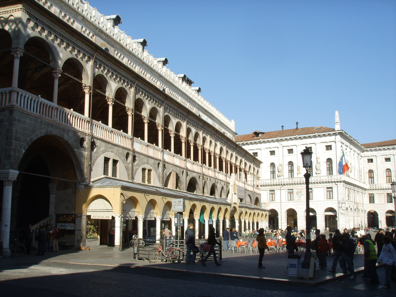 Padova, palazzo della ragione